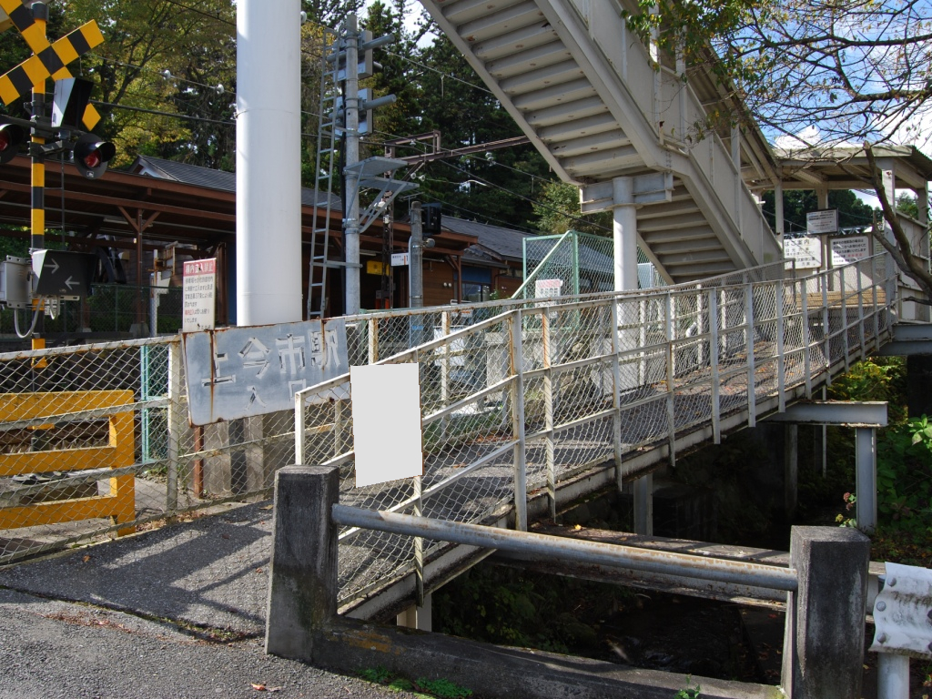 東武鉄道日光線上今市駅北口出入口（2008/10/28撮影）